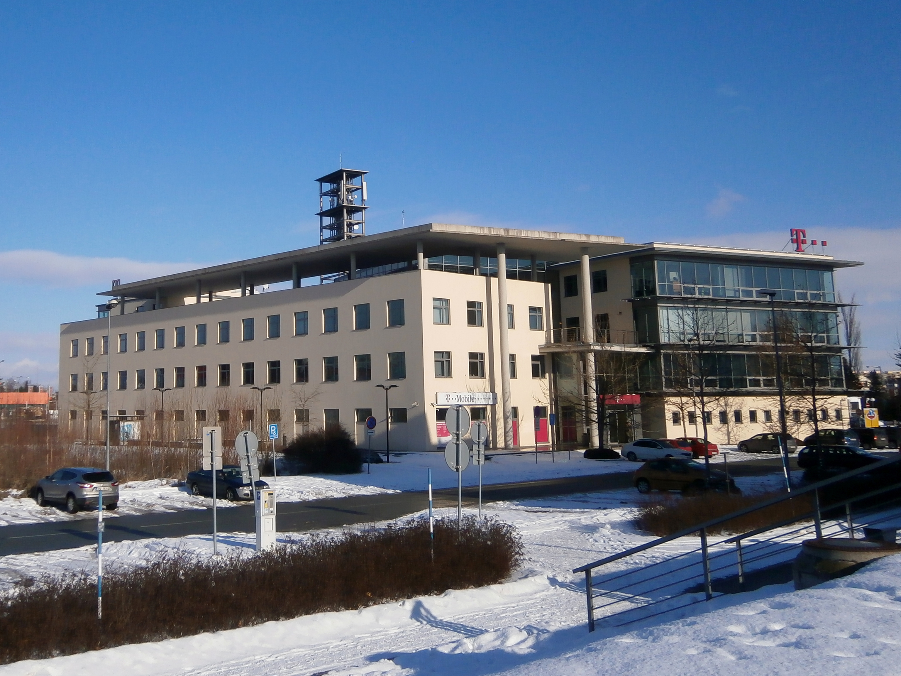 Zákaznické centrum T-Mobile v Hradci Králové, Věkoše, Collinova 420.